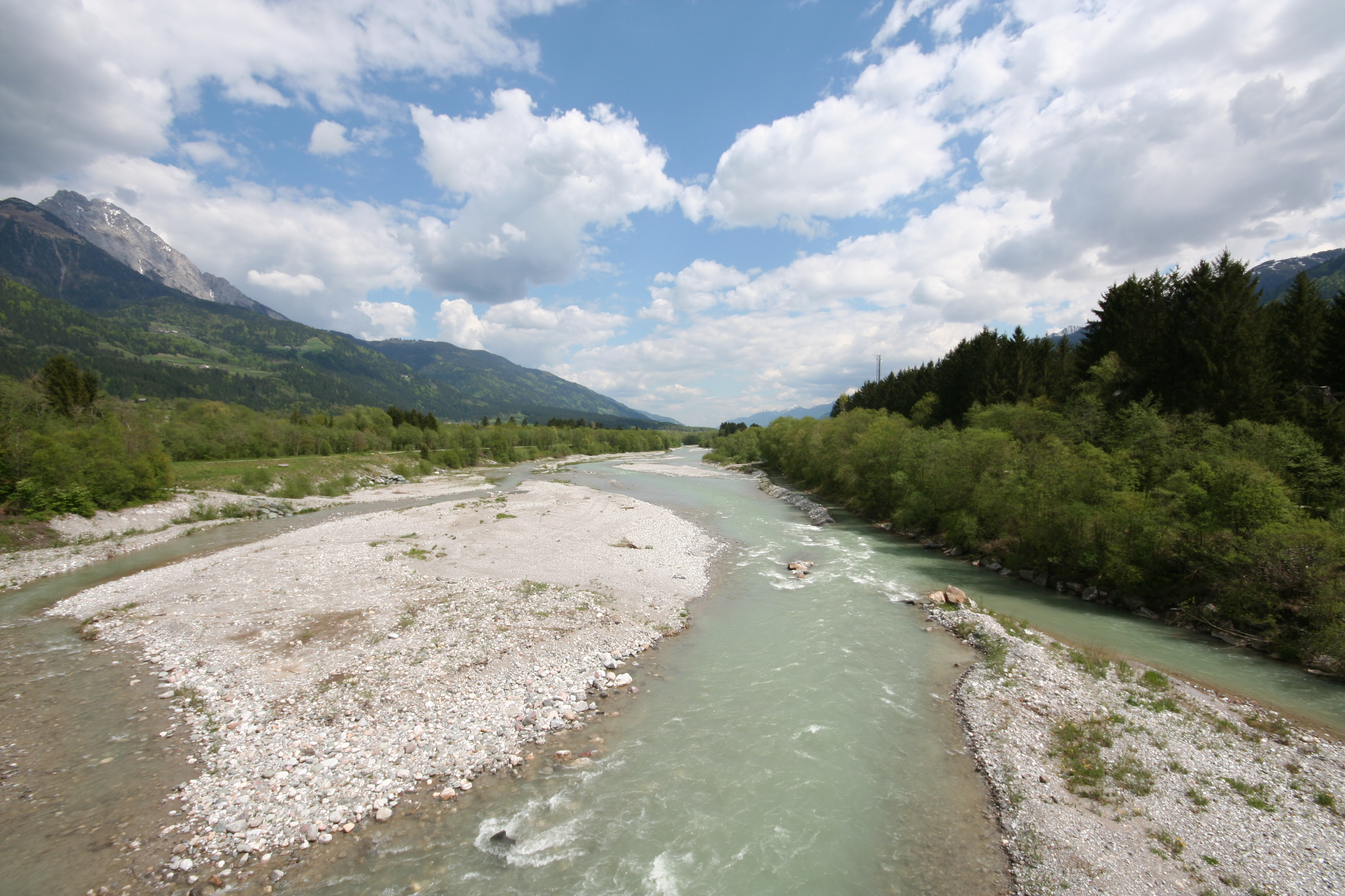 Gail bei Dellach, Blick Richtung Osten, links im Bild der Reißkofel